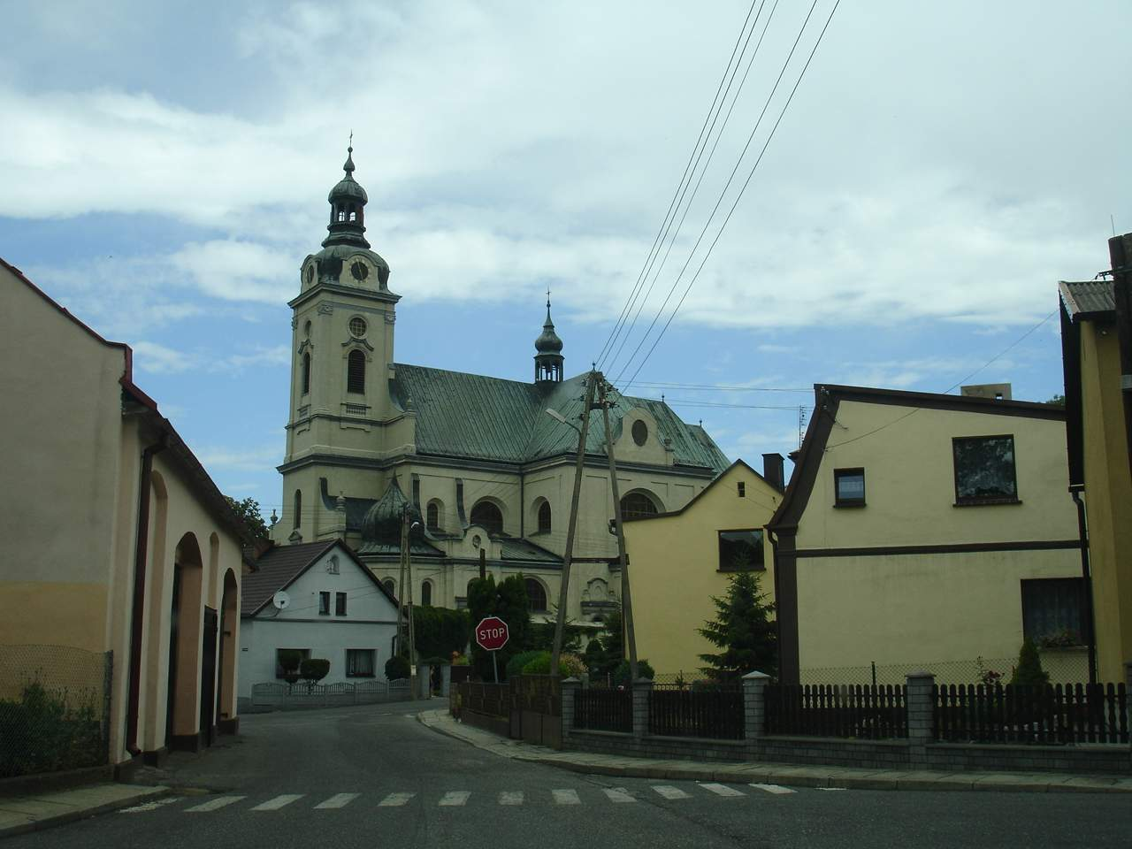 Krzanowice latin church